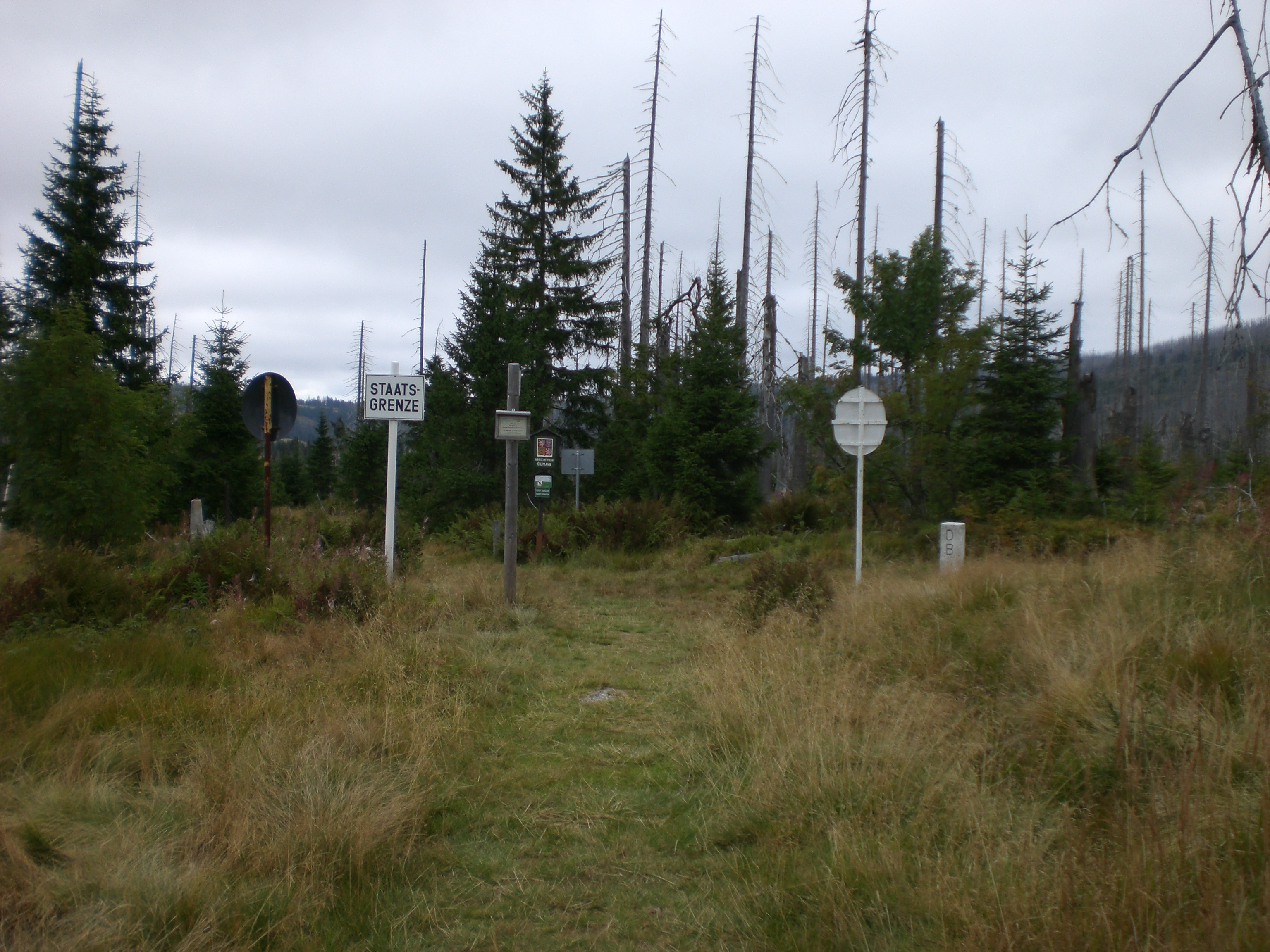 Selbsterstelltes Foto vom Grenzübergang Blaue Säulen unterhalb des Lusengipfels vom 7.9.2008